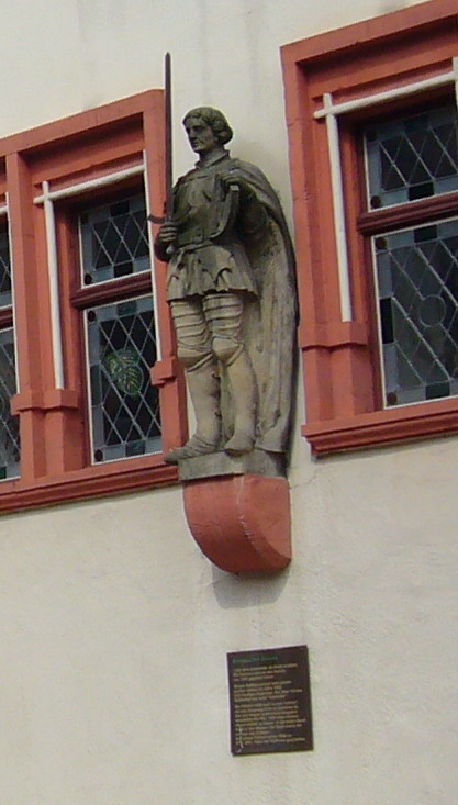 Roland am Oebisfelder Rathaus